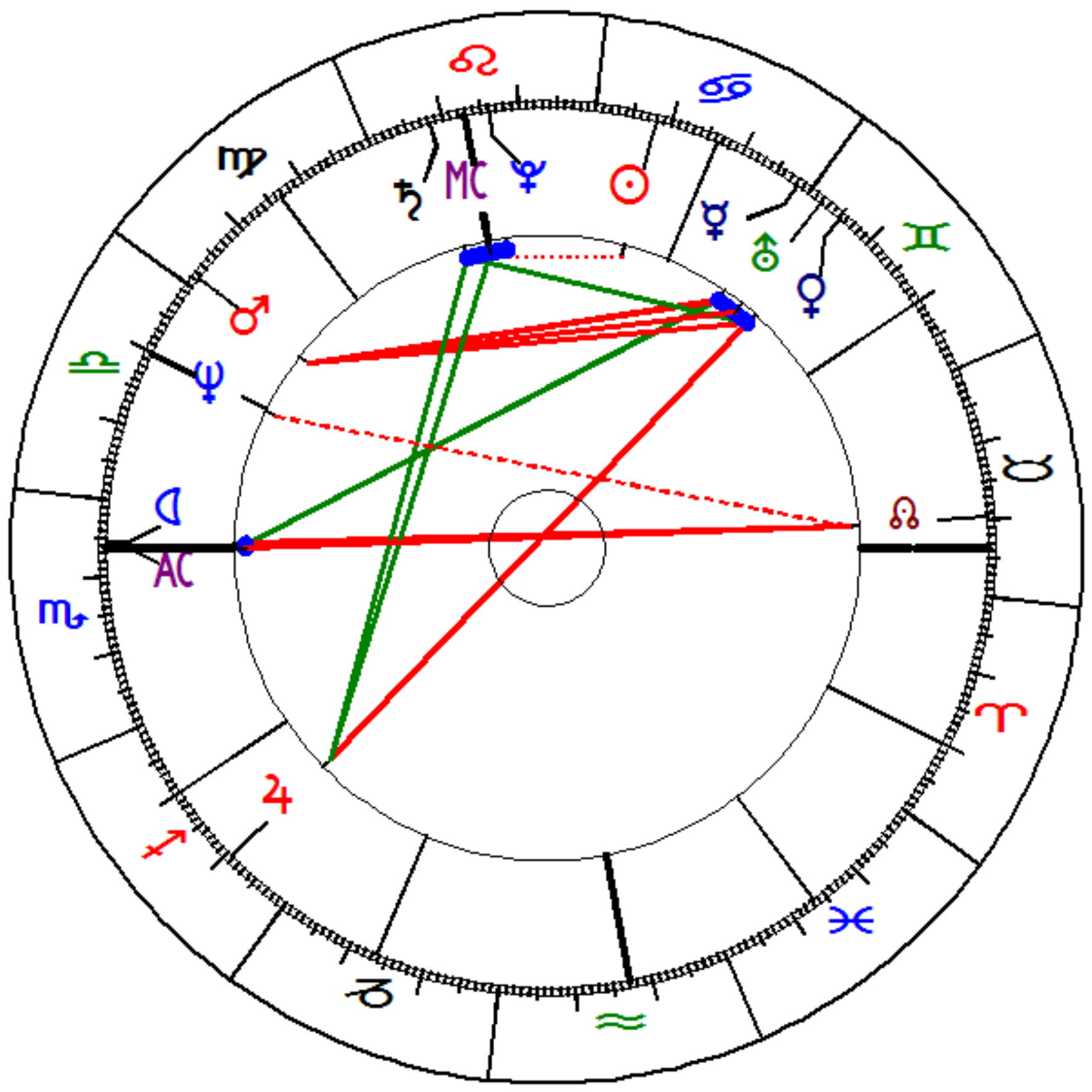 Geburtshoroskop von Gottfried Briemle